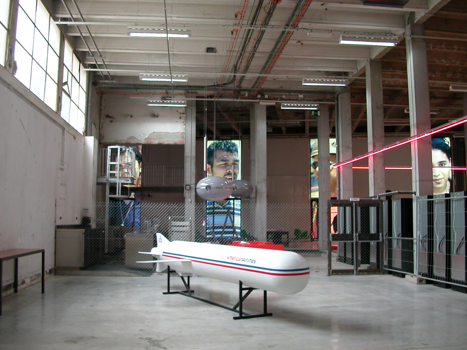 Vue générale d'une exposition au Palais de Tokyo / Site de création contemporaine, Paris.